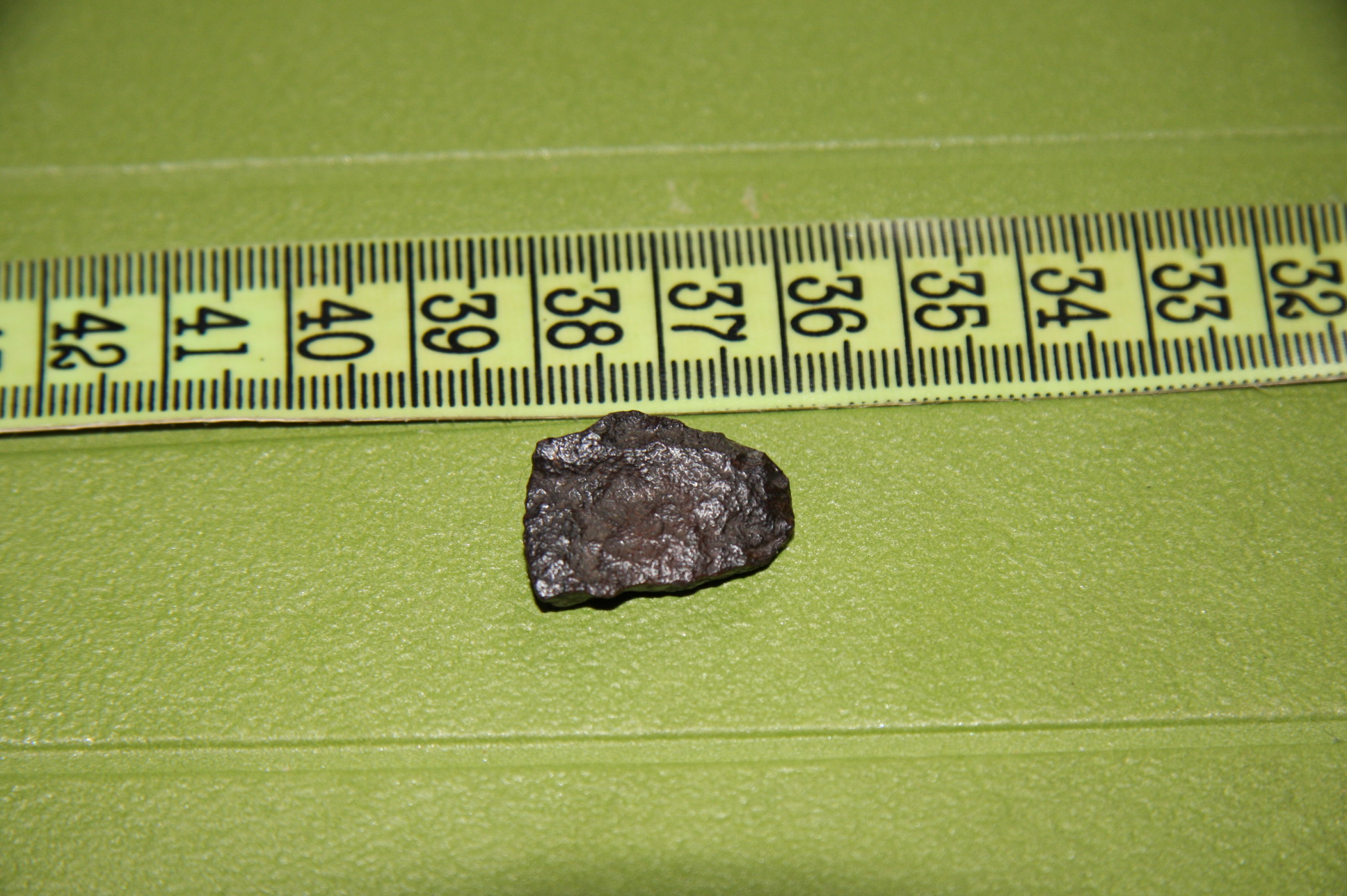 На изображении камень карбонадо или, как его называют, черный алмаз; его происхождение, скорее всего, внеземное, так как он найден в Воронежской области, где кроме меловых гор ничего нет. Также очень часто в этой местности находят метеориты.